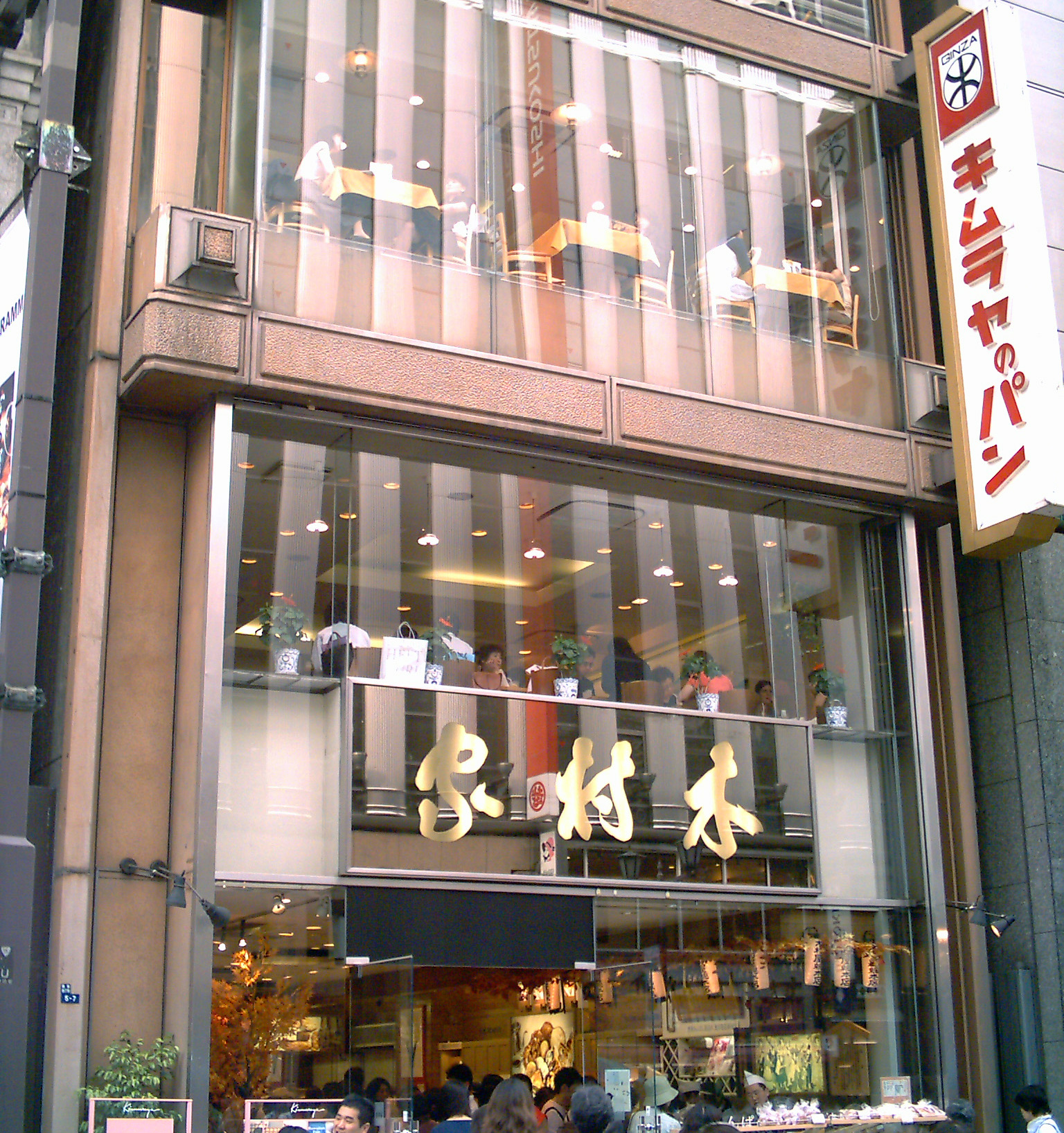 Ginza_kimuraya_Bread_japan photography day, 2006.9.16. photography person kici